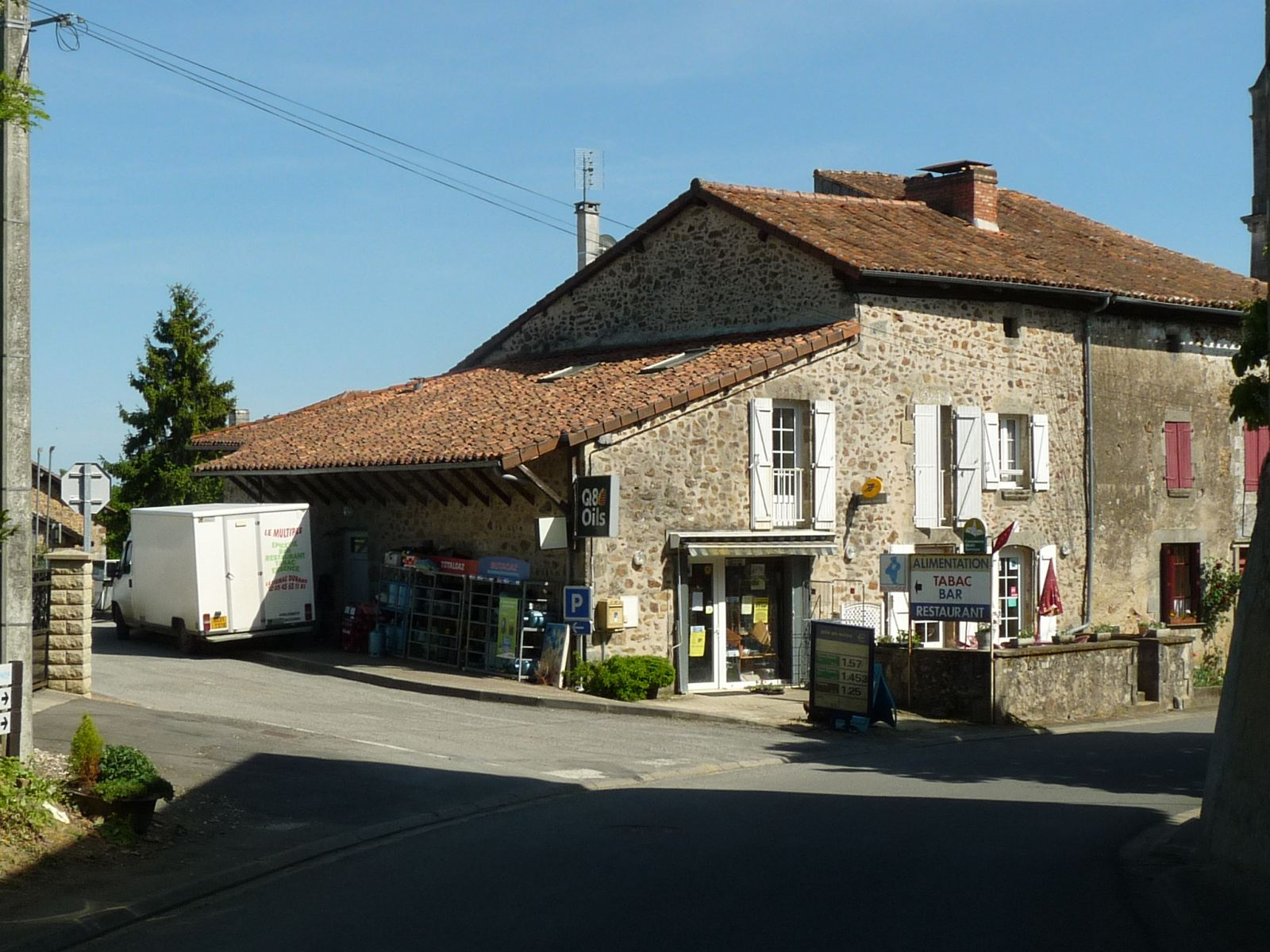 restaurant-épicerie de Lésignac-Durand, Charente, France